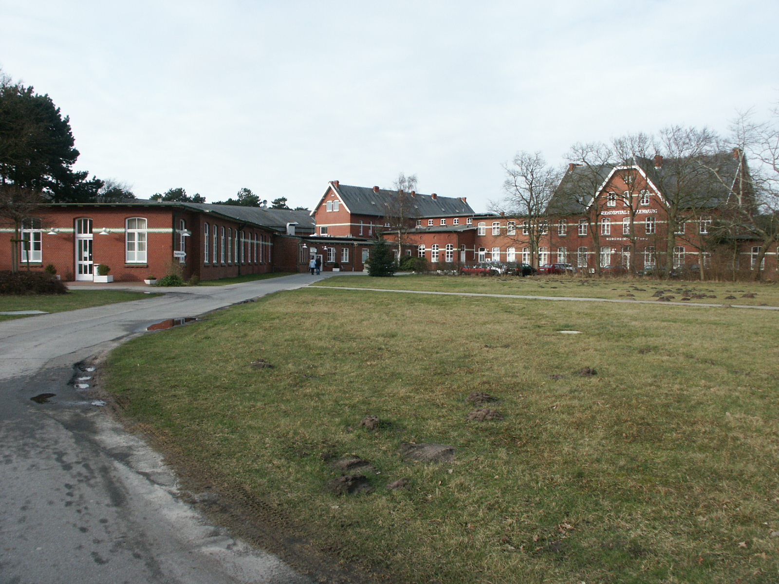 Fotografie des Seehospitals Sahlenburg, Lungenheilstätte bei Cuxhaven